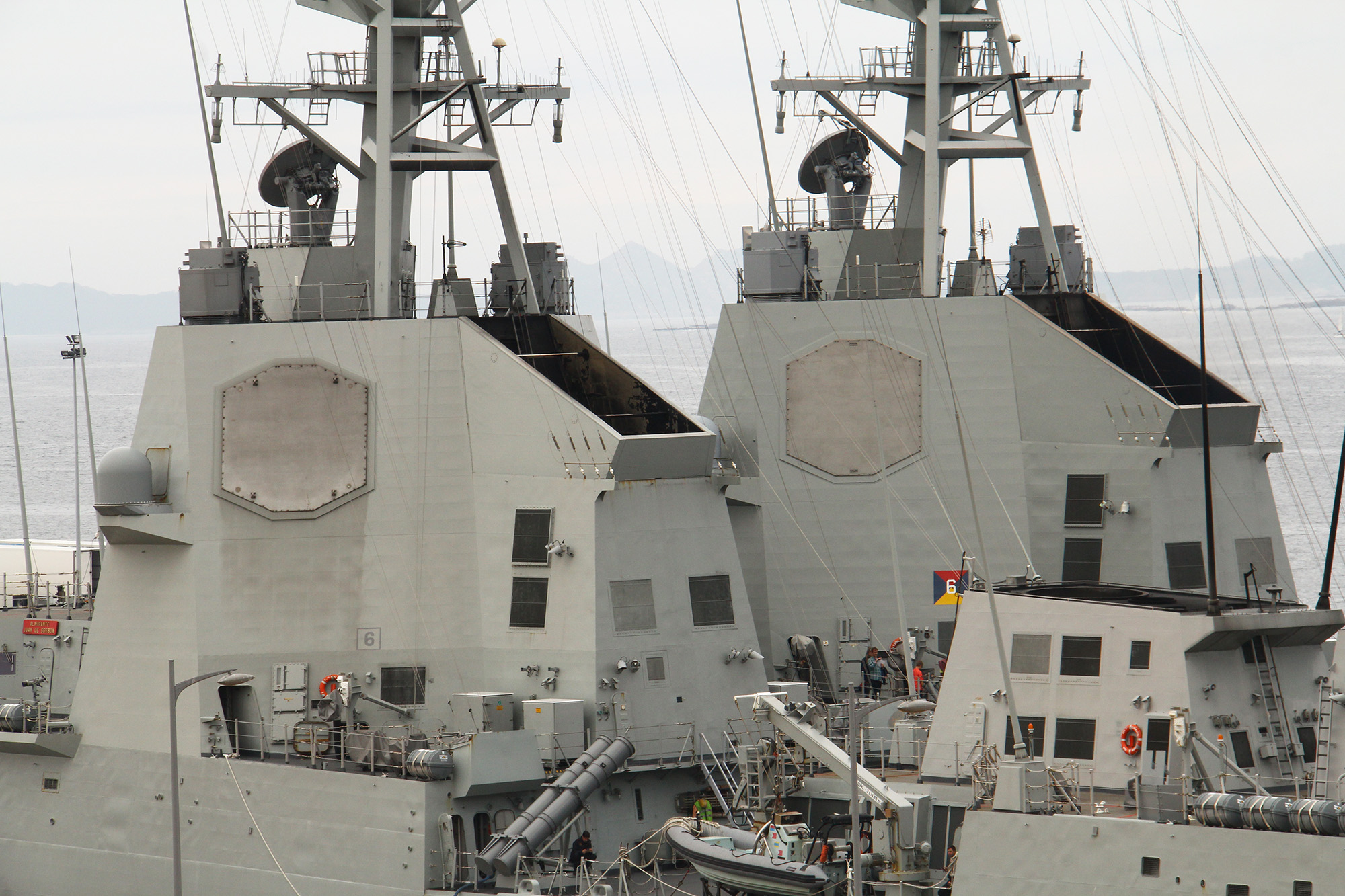 Visita a Vigo de las fragatas "Álvaro de Bazán" F-101 y "Almirante Juan de Borbón" F-102 de la Armada Española, ambas de la clase "Álvaro de Bazán" (también conocida como F-100), el 27 y 28 de mayo de 2017. Frigates F-100 in Vigo Visit to Vigo of the frigates "Álvaro de Bazán" F-101 and "Admirante Juan de Borbón" F-102 of the Spanish Navy, both of the class "Álvaro de Bazán" (also known as F-100), May 27 and 28, 2017.